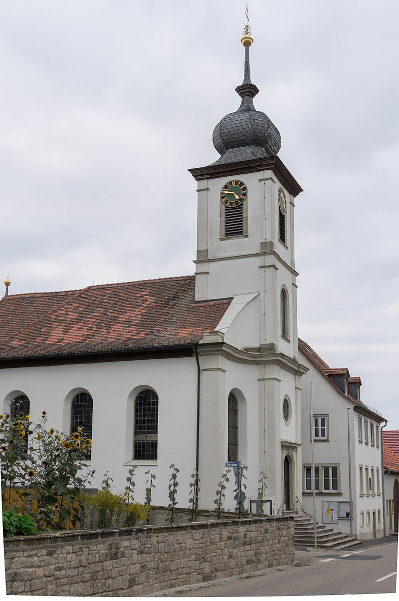 Katholische Pfarrkirche Ingolstadt Ufr